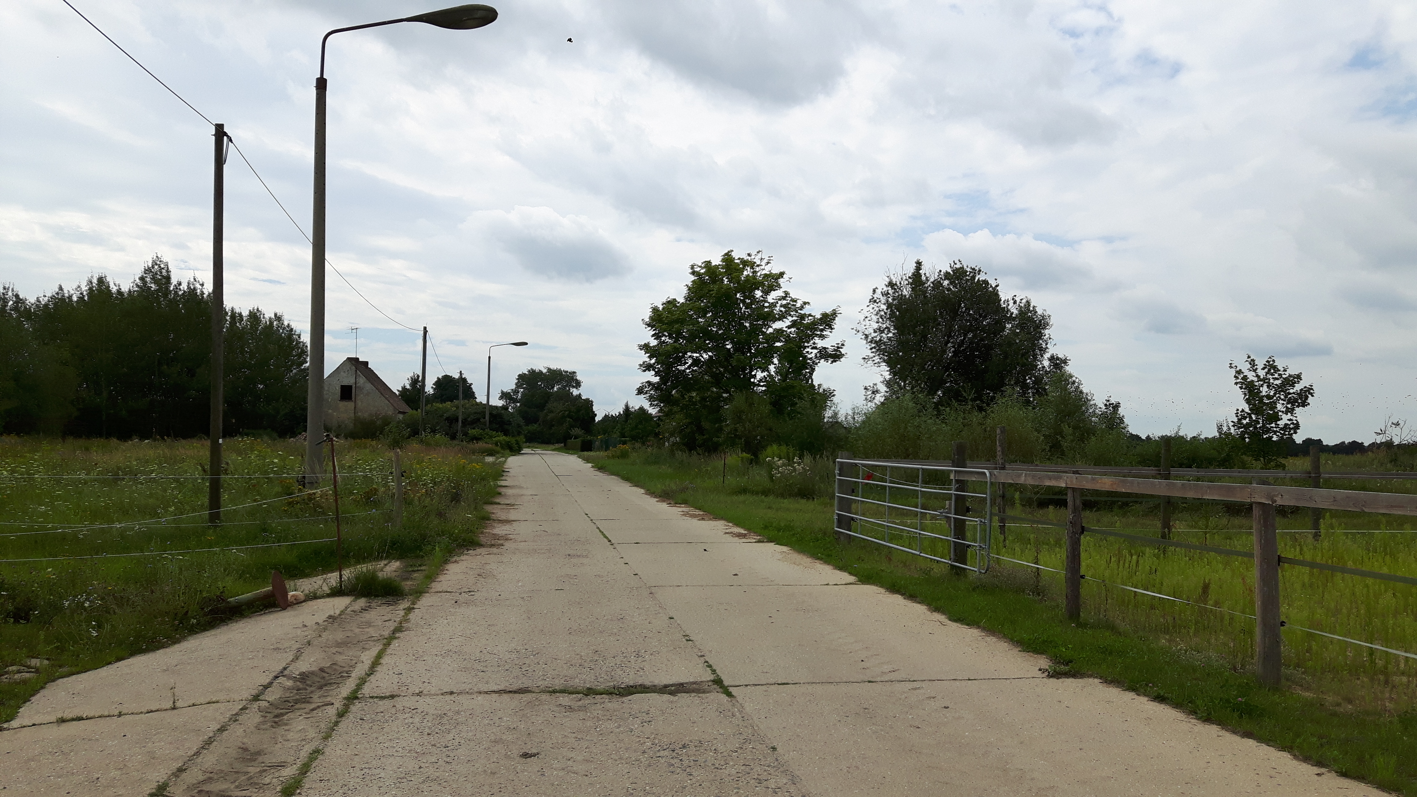 Alte Straße in Dubrau.